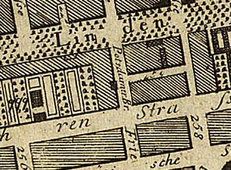 Potsdamer Brücke im Straßenzug der Friedrichstraße südlich Unter den Linden. Auf der Westseite der Straße ist die in das Straßenprofil hineinragende Kolonnade zu erkennen.